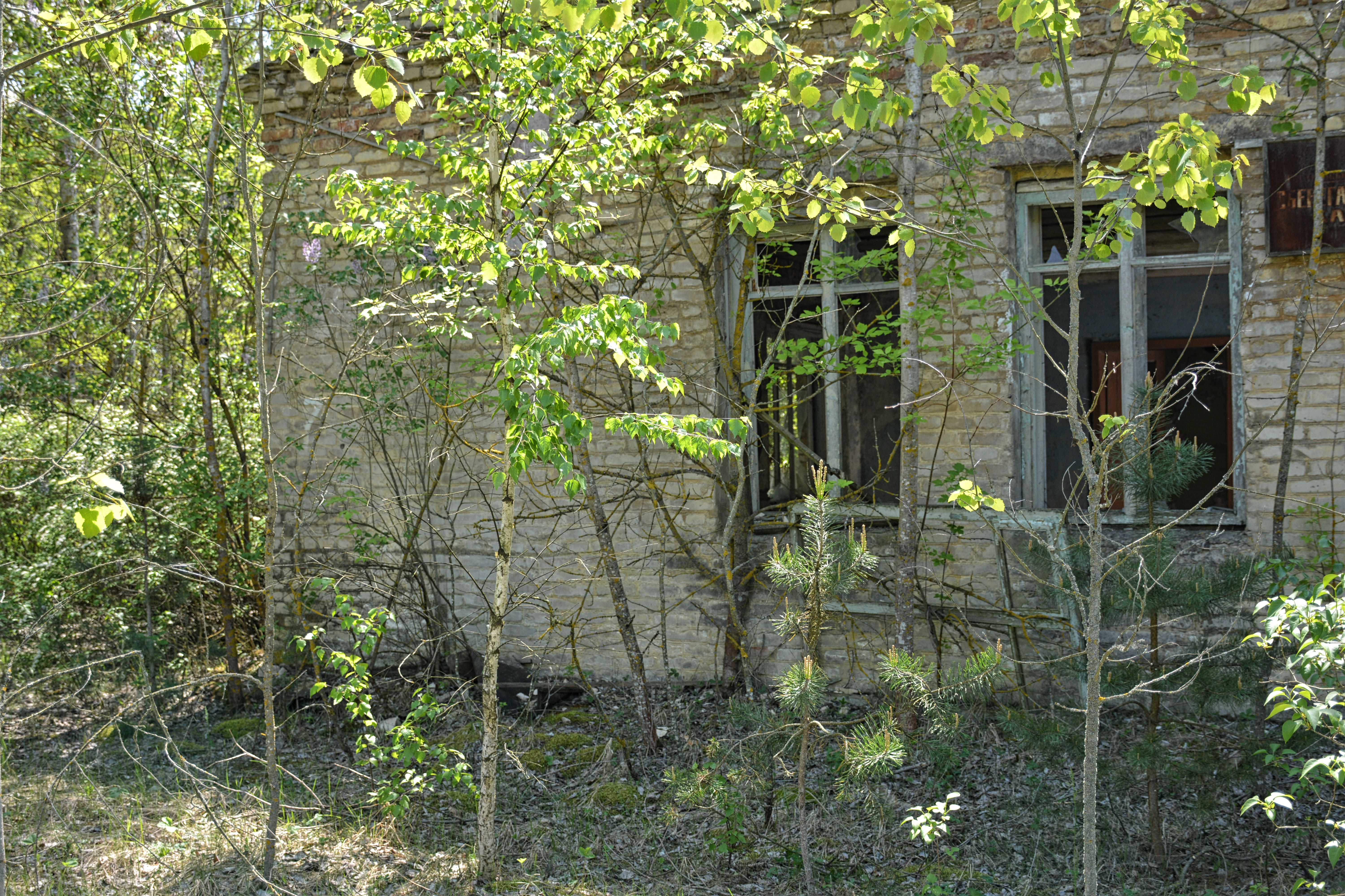 фото_4